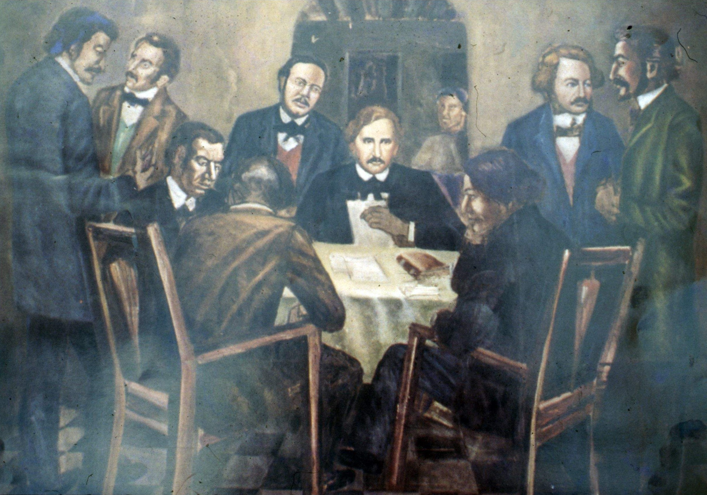 Representación de la sociedad secreta La Trinitaria.